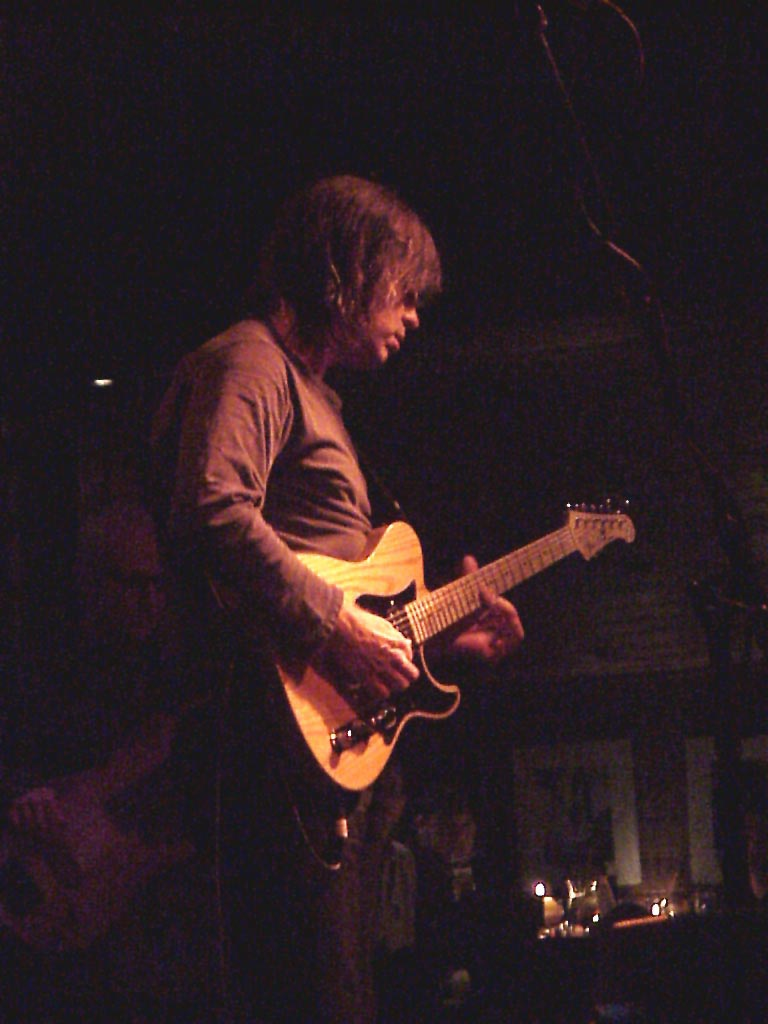 Mike Stern, Bayrischer Hof, Munich/Germany, April 2001